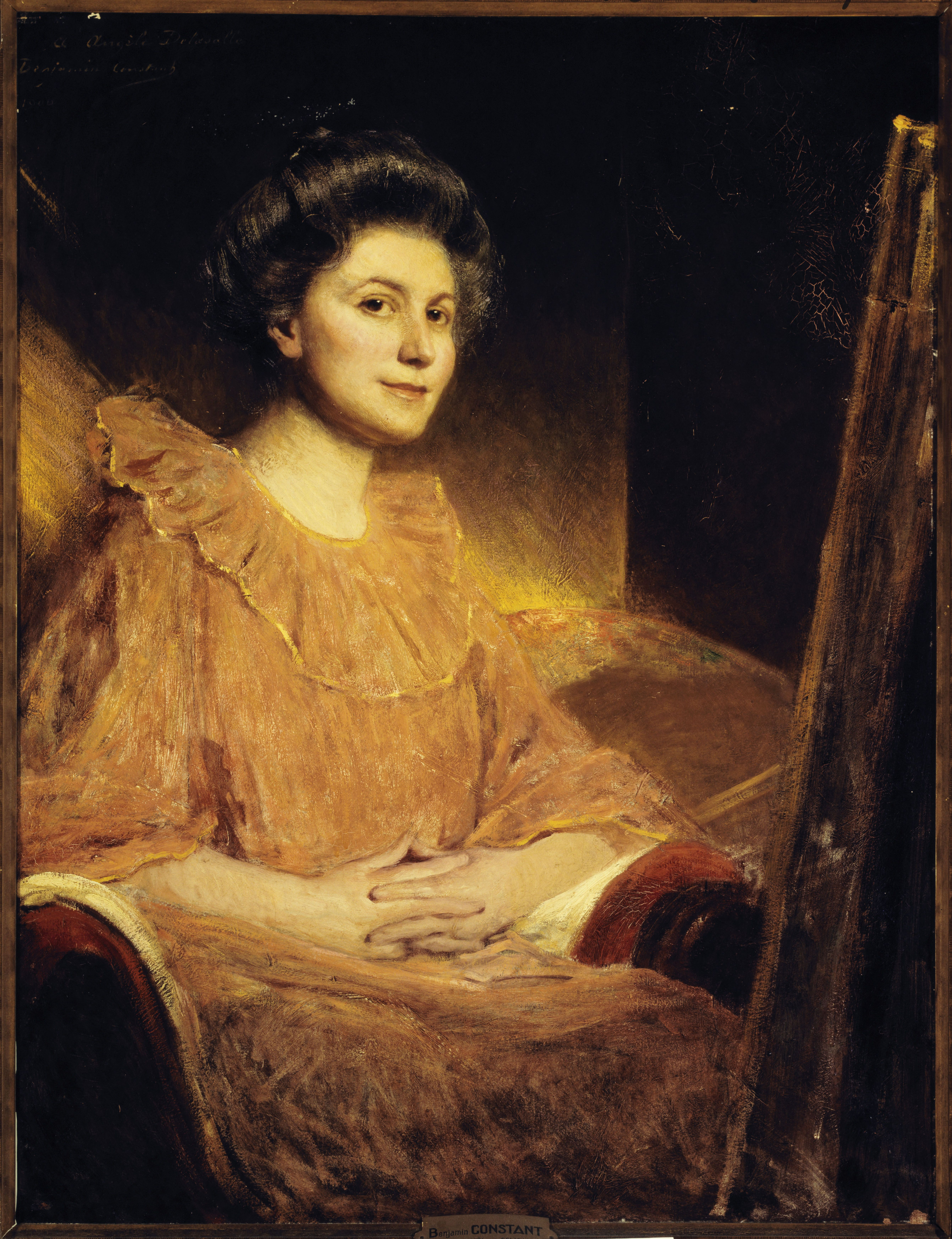 Porträt der Malerin Angèle Delasalle; Maltechnik Öl auf Leinwand; 101 x 76.5 cm; Petit Palais, musée des Beaux-arts de la Ville de Paris